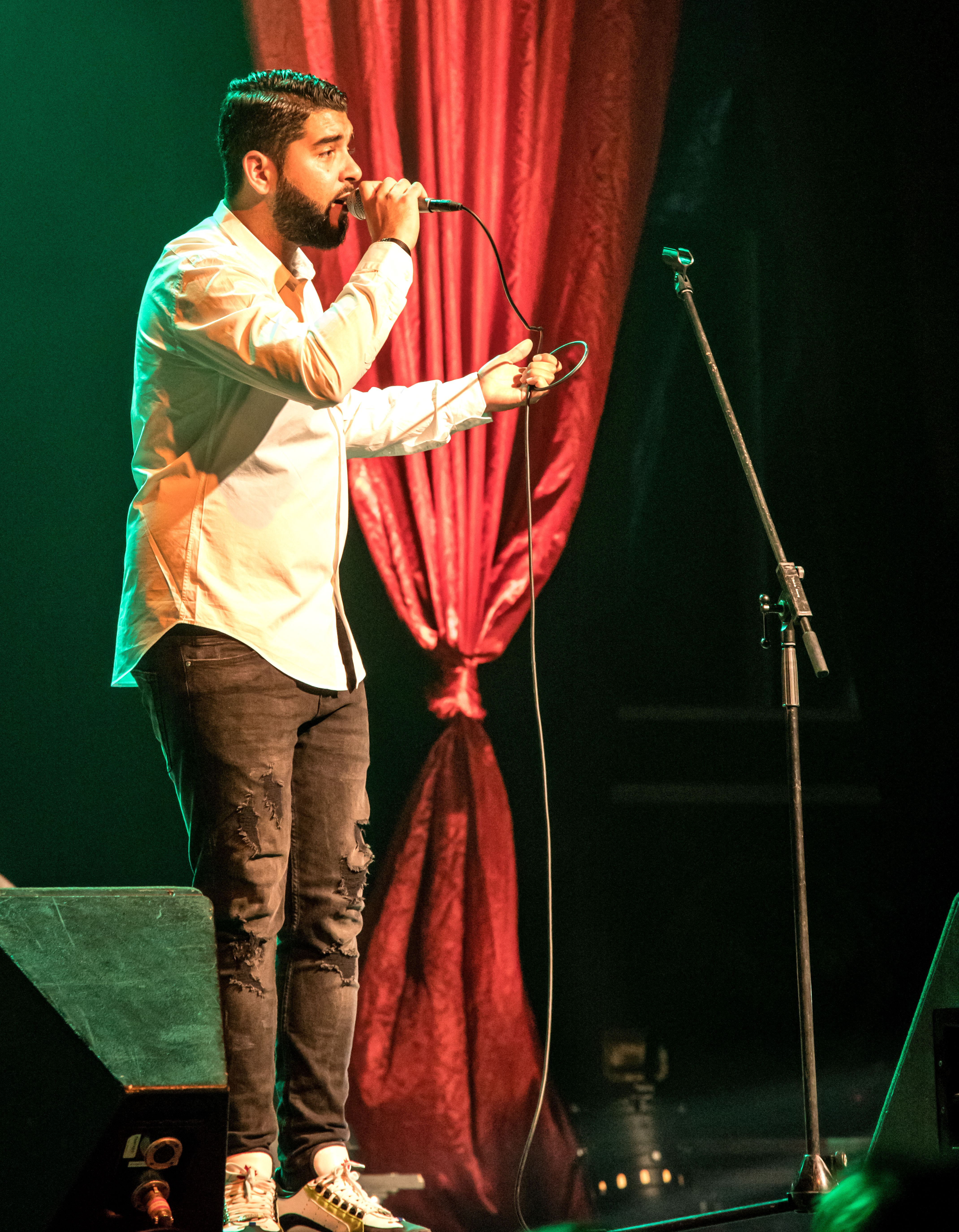 Bilder vom Zelt Musik Festival 2016 in Freiburg im Breisgau Gipsy Kings